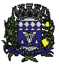 Brasão de Suzanápolis